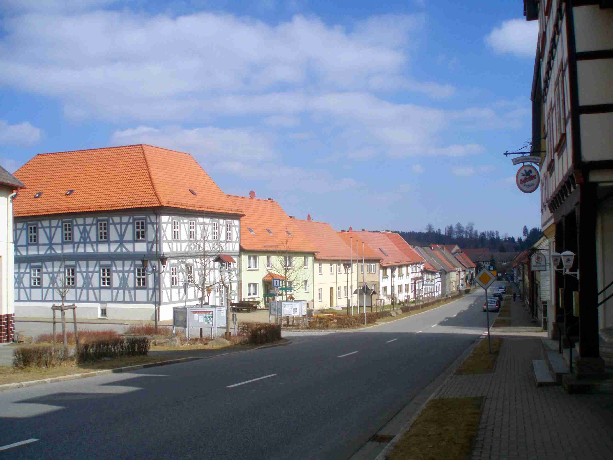 Hauptstraße Güntersberge